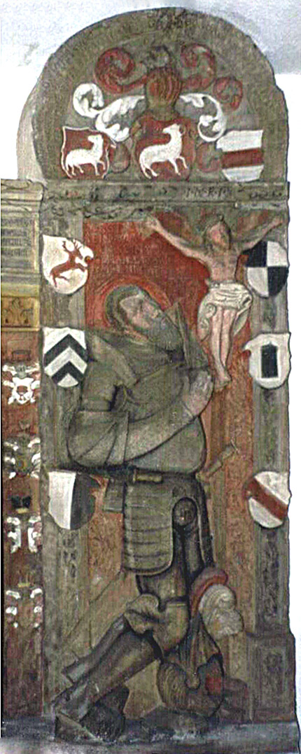 Epitaph von Georg Wolf von Kotzau in der St. Jakobuskirche von Oberkotzau